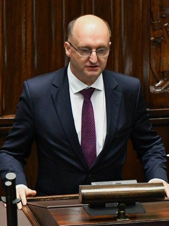 Piotr Wawrzyk, politolog i urzędnik państwowy.